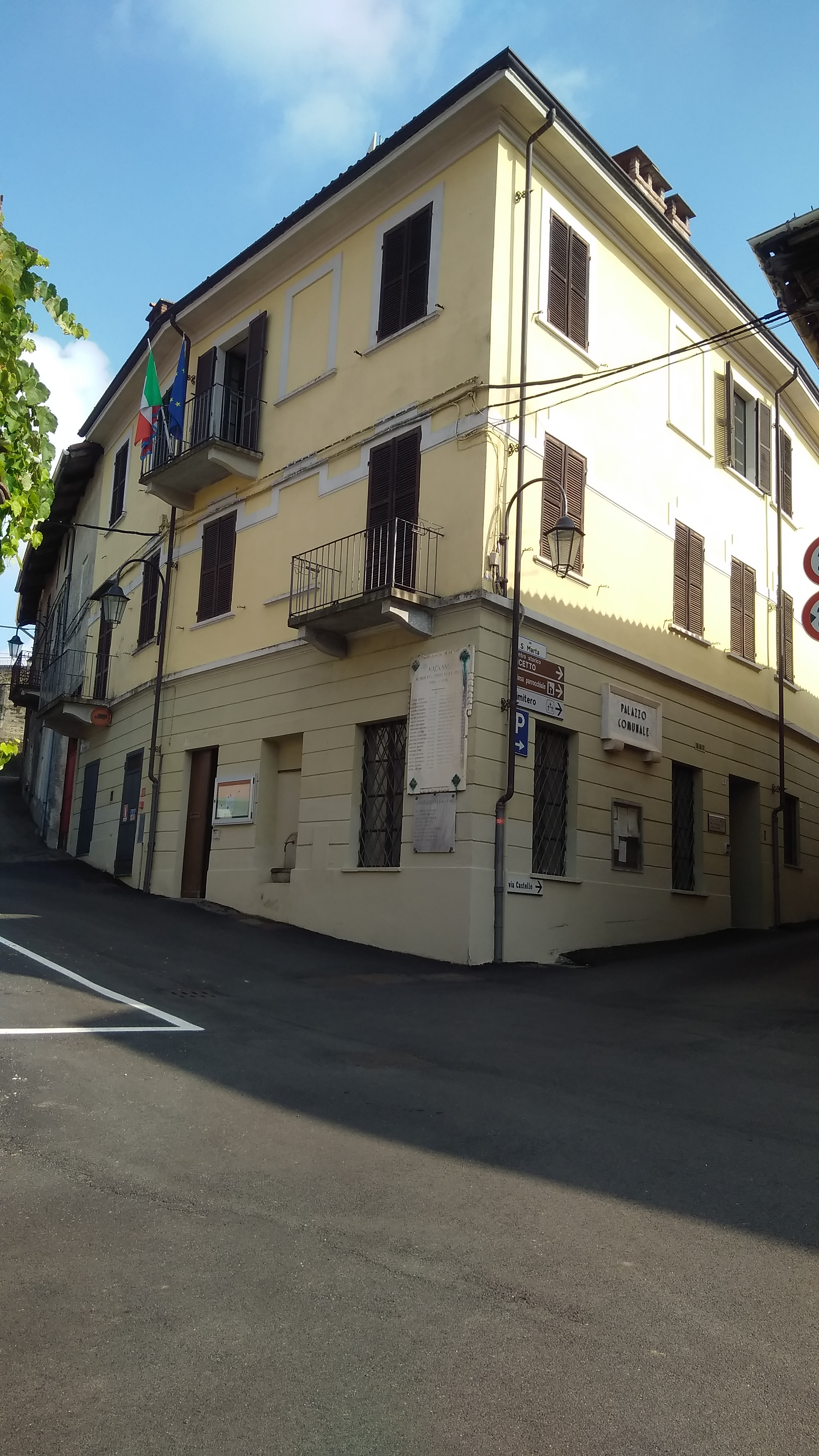 Il municipio di Magnano (prov. di Biella)